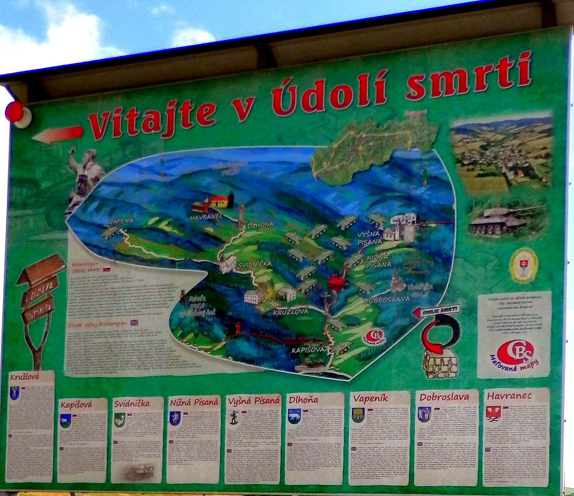 Údolie smrti, Slovensko. Detail informačnej tabule. Ústredný pamätník tankistom, kataster mesta Svidník.